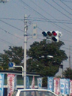 渋井交差点近景（埼玉県川越市大字渋井字上駿河）